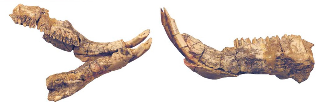 Holotype (INGEO-PV 87) of the hydrochoerine rodent Cardiatherium calingastaense sp. nov., late Miocene, Puchuzum, San Juan Province, Argentina.